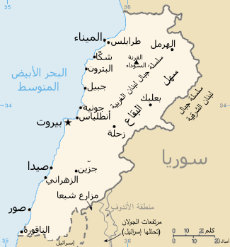 خريطة لُبنان باللُغة العربيَّة.